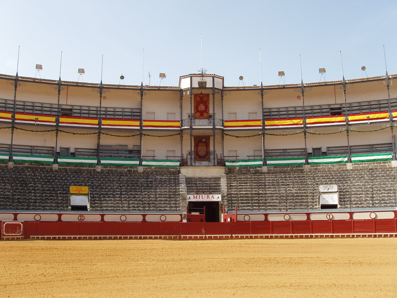 Plaza de Toros de El Puerto de Santa María